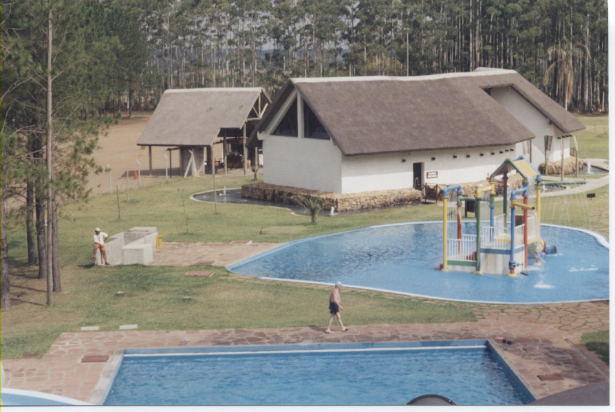 Foto panorámica del Parque Acuático "Horacio Quiroga", en las Termas de Salto Grande, Salto, Uruguay.